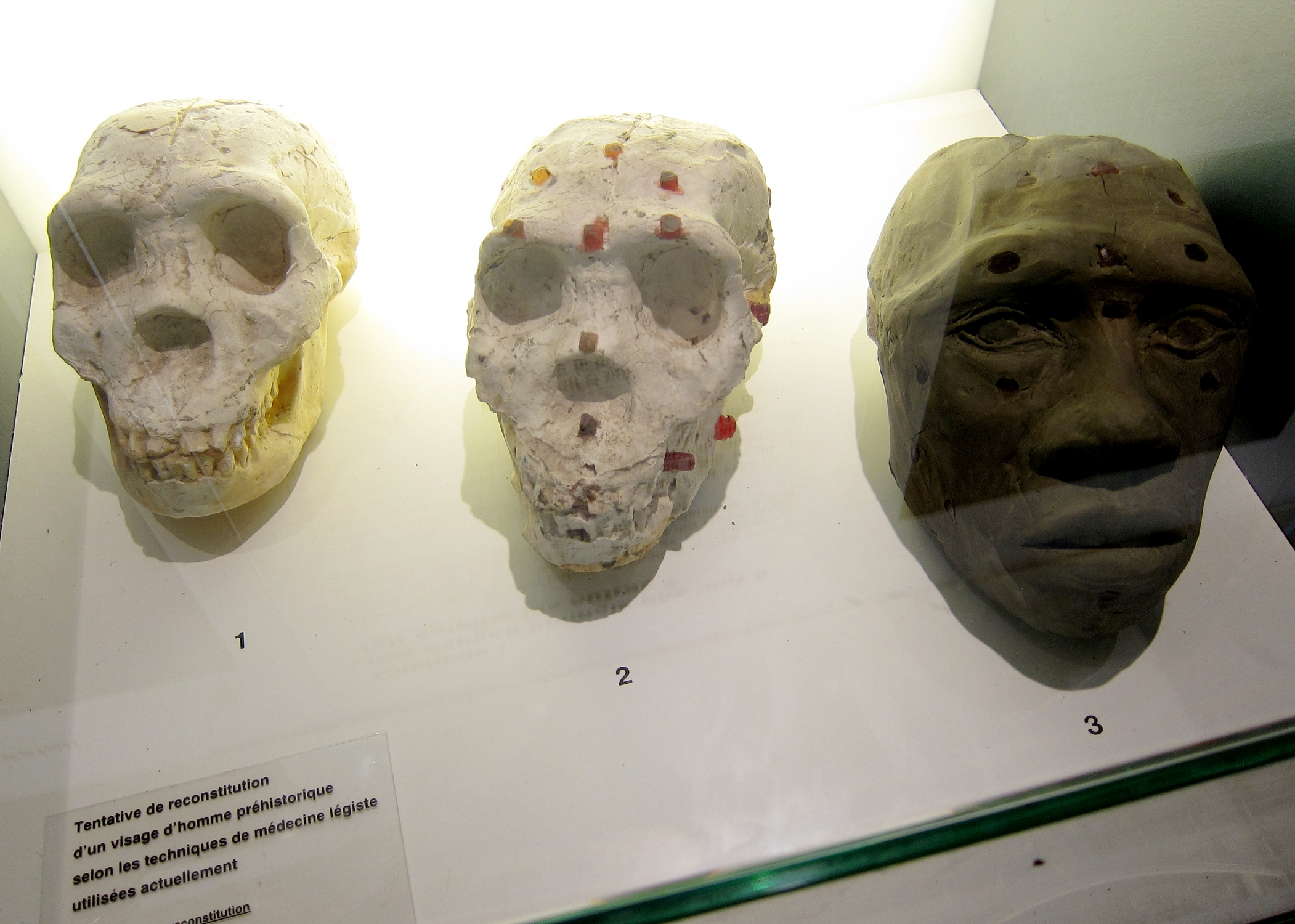 Reconstitution d'un visage d'homme préhistorique au musée d'histoire naturelle de Lille (Nord).